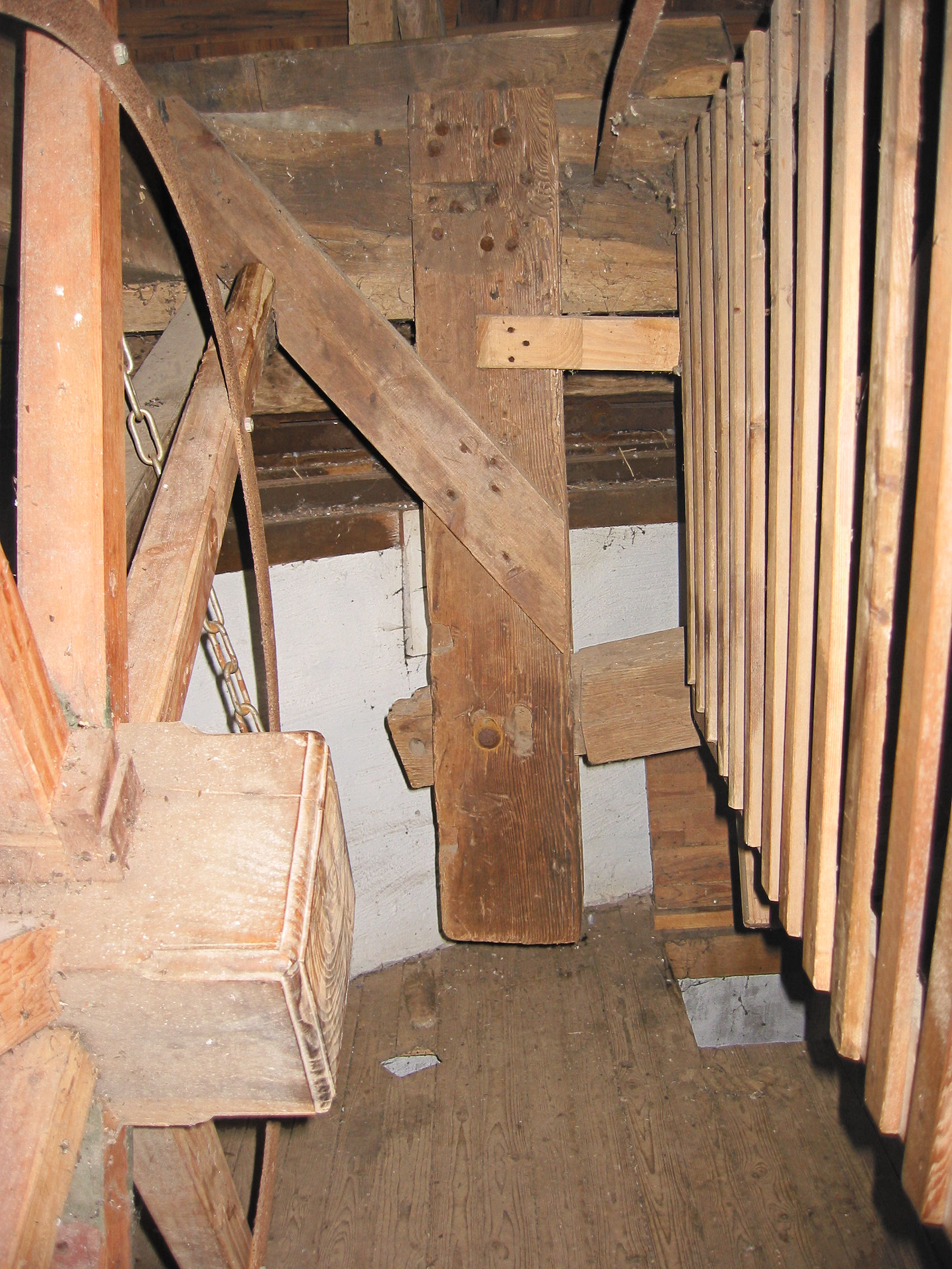 Molen De Zwaan ezel en binnenkruihaspel, Lienden, Gelderland, the Netherlands